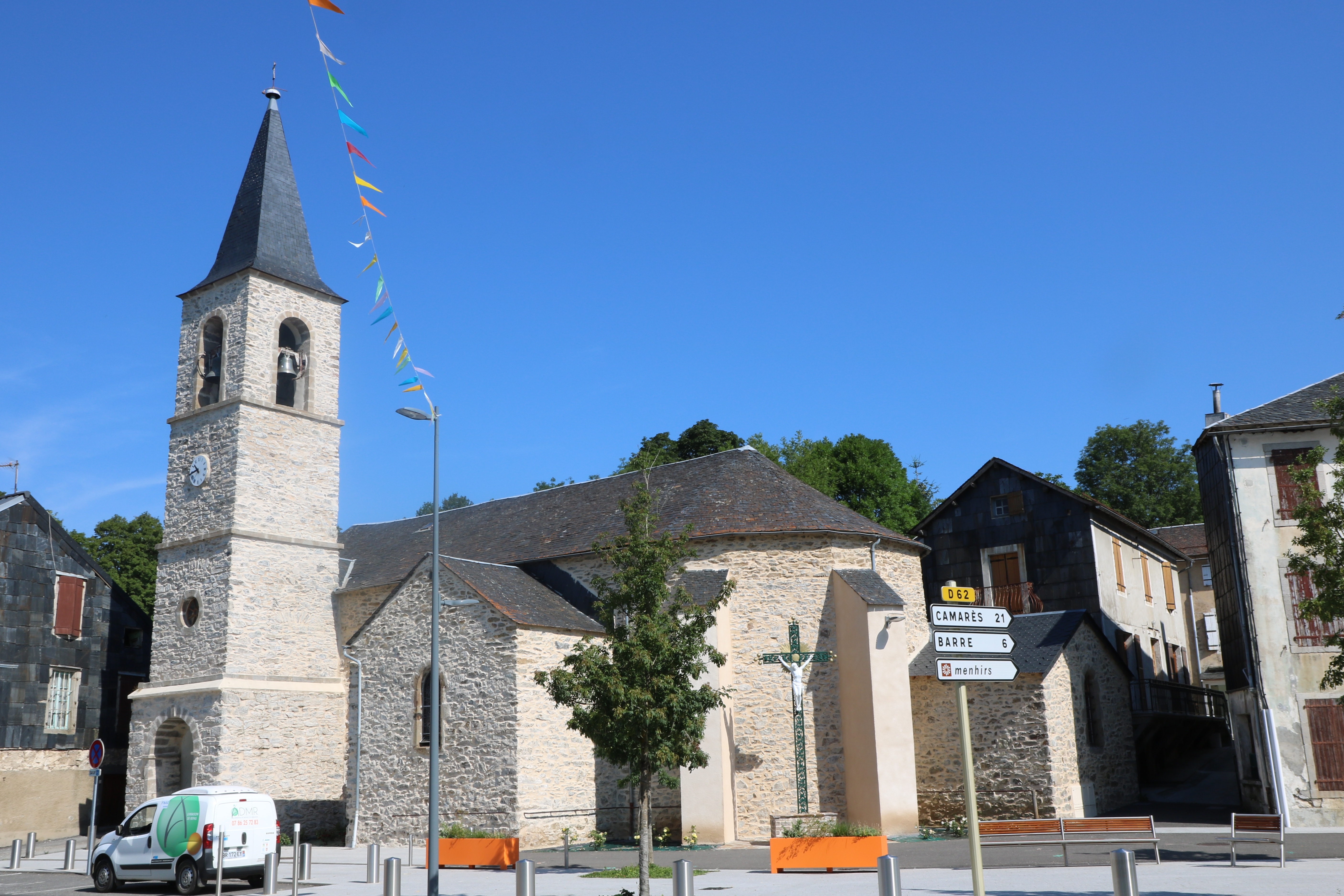 Moulin-Mage (Tarn) - Église Notre-Dame (1836) et croix (photo prise en 2018).